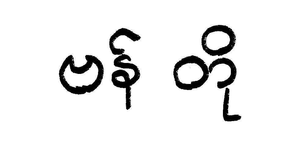 graphie_bando.jpg